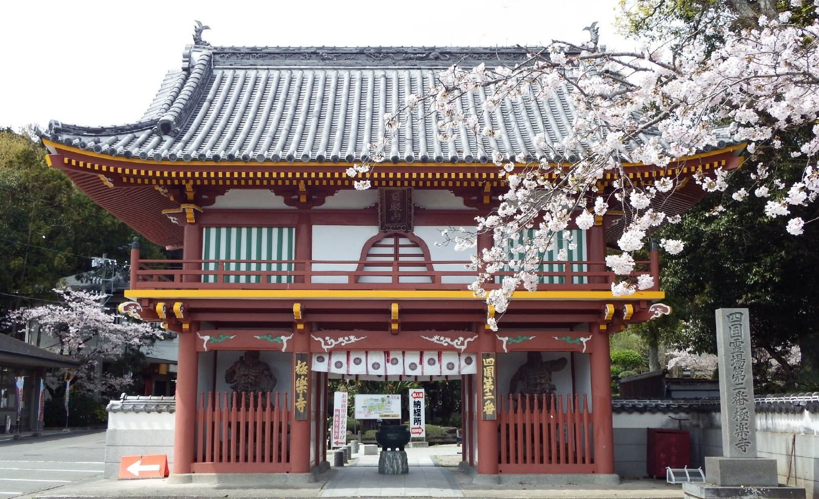 極楽寺の仁王門